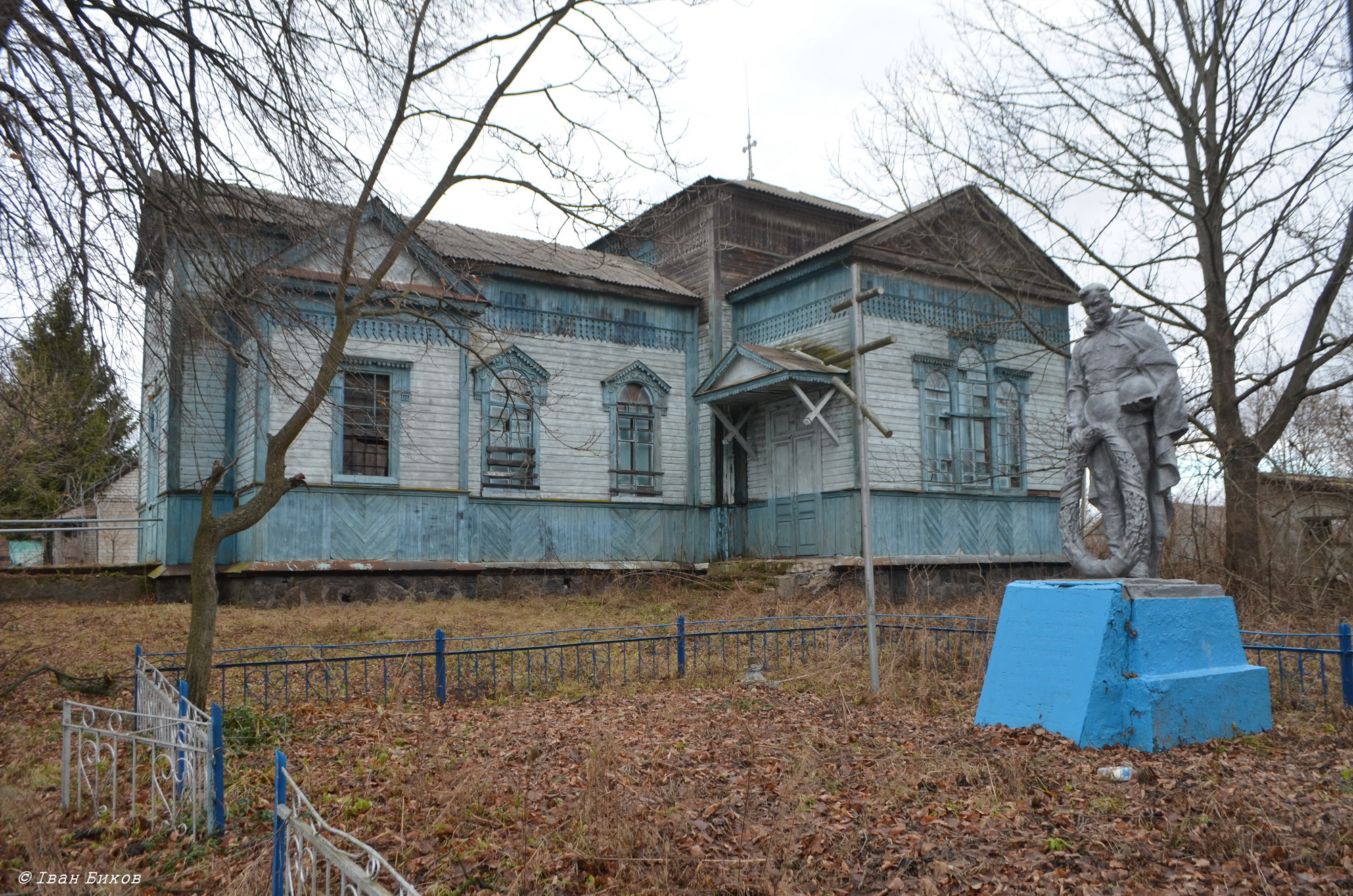 Братська могила радянських воїнів. Поховано 26 чоловік, Брусилівський район, с. Болячів , Водотиївська с/р, біля клубу